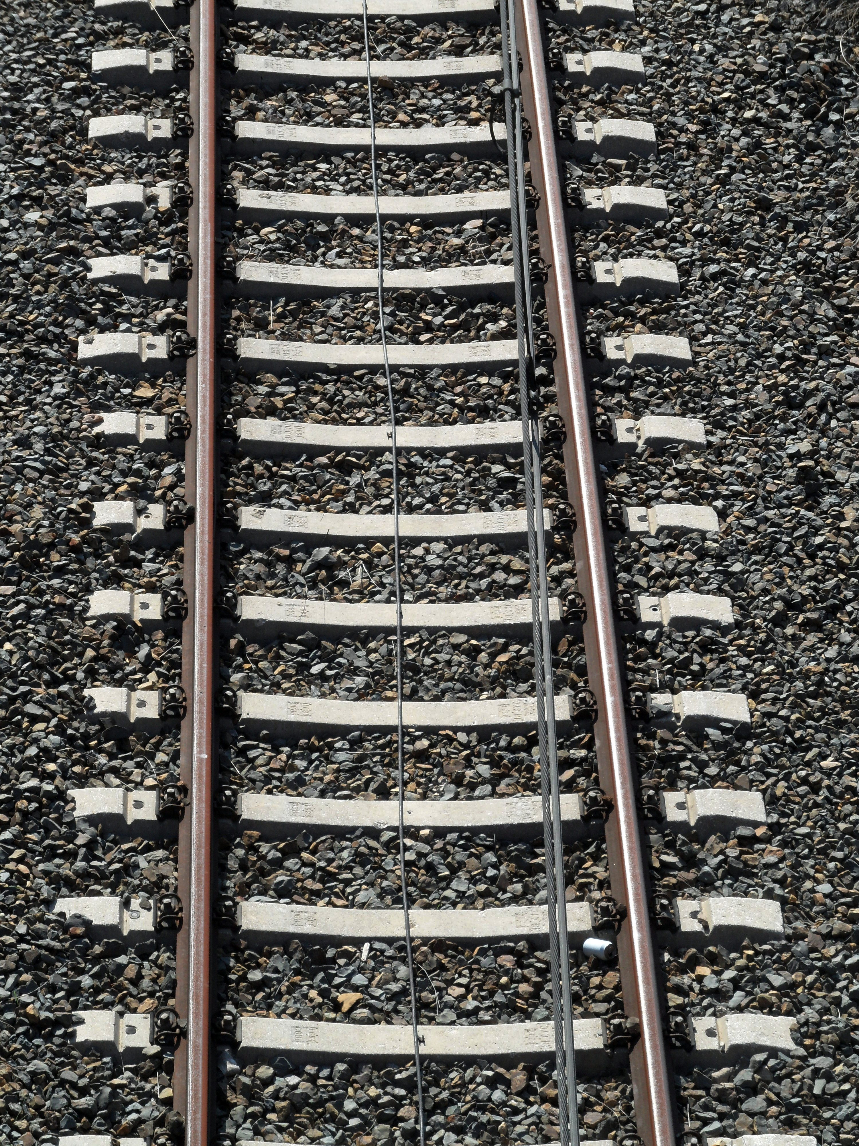 Verbindungsgleis zur ehemaligen Umspuranlage bei Córdoba, Betonschwellen für Oberbauanordnung W sowie Regel- und Breitspurbetrieb (»traviesas polivalentes«) in Regelspurstellung.